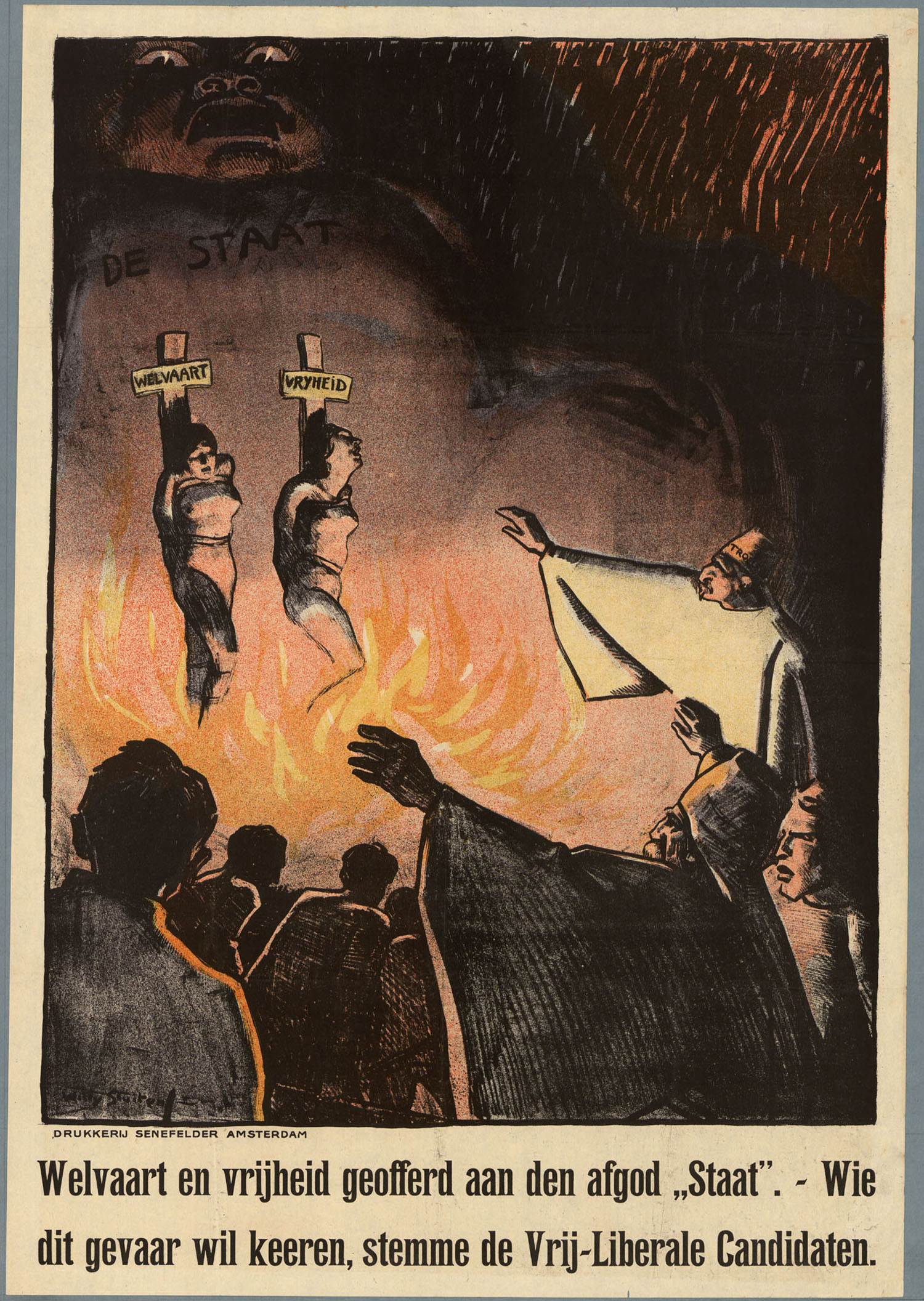 [Welvaart en vrijheid geofferd aan den afgod "Staat" : wie dit gevaar wil keeren, stemme de Vrij-Liberale candidaten.] Internationaal Instituut voor Sociale Geschiedenis (Amsterdam) Designer: Willy Sluiter Organisatie: Bond van Vrije Liberalen Fysieke beschrijving: Lithografie; 77.5x54 cm. Gepubliceerd in: 1918 (Amsterdam :Senefelder, Materiaalsoort: Poster Bron